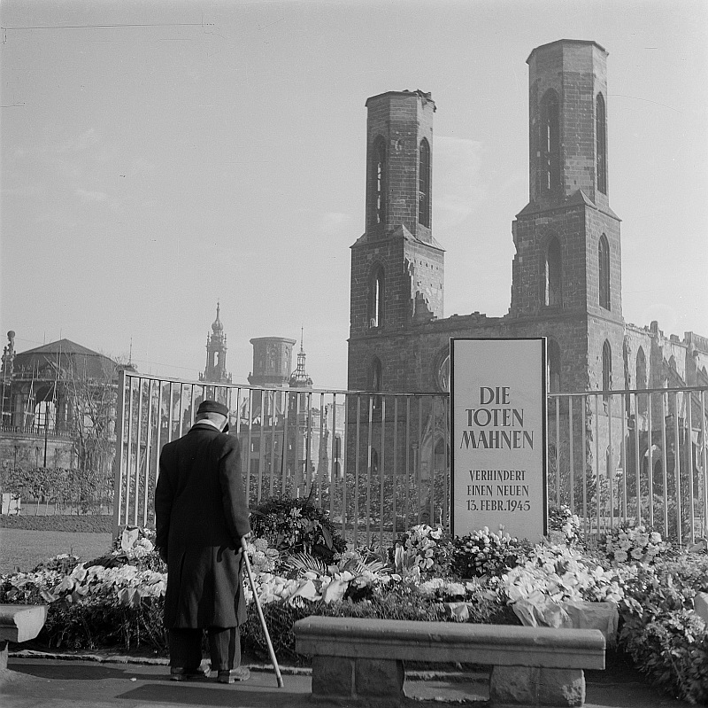 Original image description from the Deutsche FotothekKranzniederlegung anläßlich des 13. Februar 1945 mit Erinnerungstafel "Die Toten mahnen. Verhindert einen neuen 13. Februar 1945". Ansicht mit Ruine der Sophienkirche